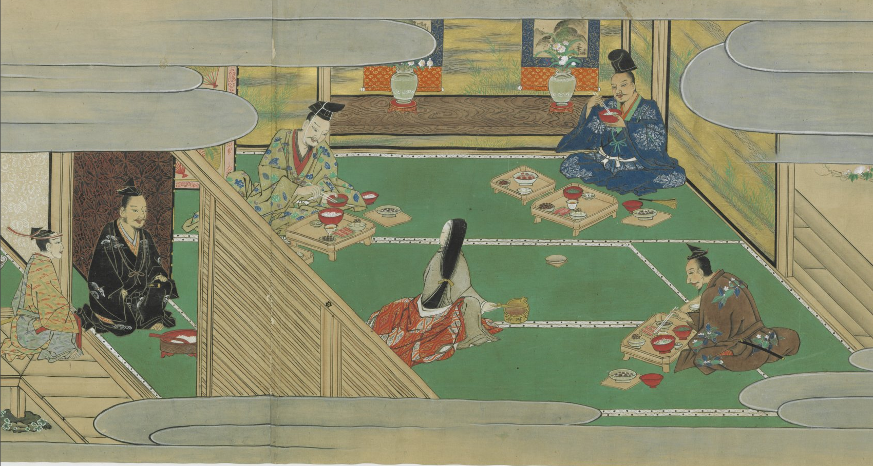 Scène 4 : le banquet défendant une position intermédiaire et raisonnable en matière de mets et de boisson, selon la position du guerrier